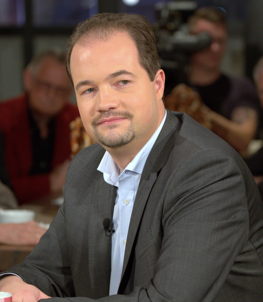 Martin Johannes Sichert, deutscher Kaufmann und Politiker (AfD). AfD-Bundestagsabgeordneter und seit 25. November 2017 bayerischer Landesvorsitzender der AfD. Titel des Werks: "Martin Sichert (AfD)"